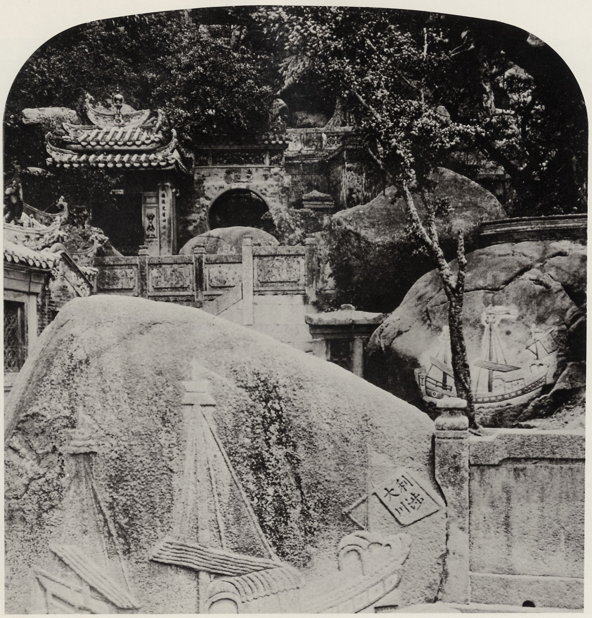 White, H.C.: Tempel von Ah Ma, Macau